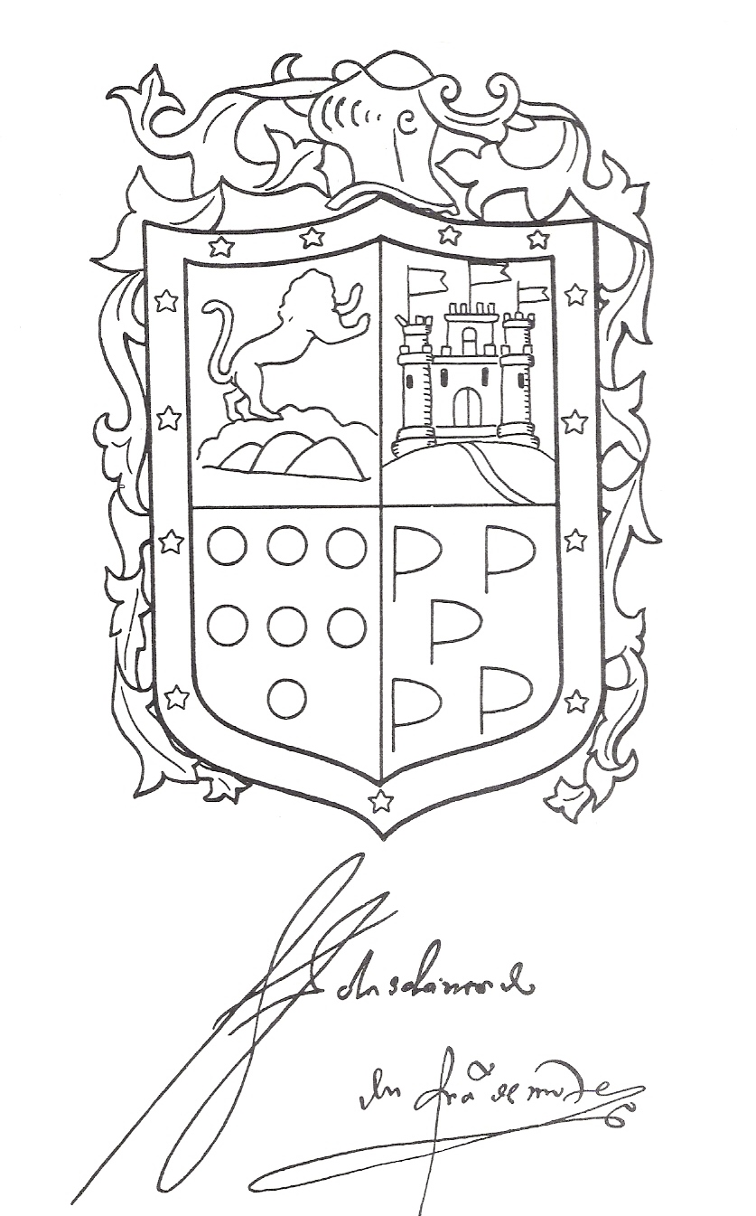 Escudo de armas de Francisco de Montejo, Adelantado de Yucatán. Nobiliario de los Conquistadores, Biblioteca Nacional de España, Madrid, 1892